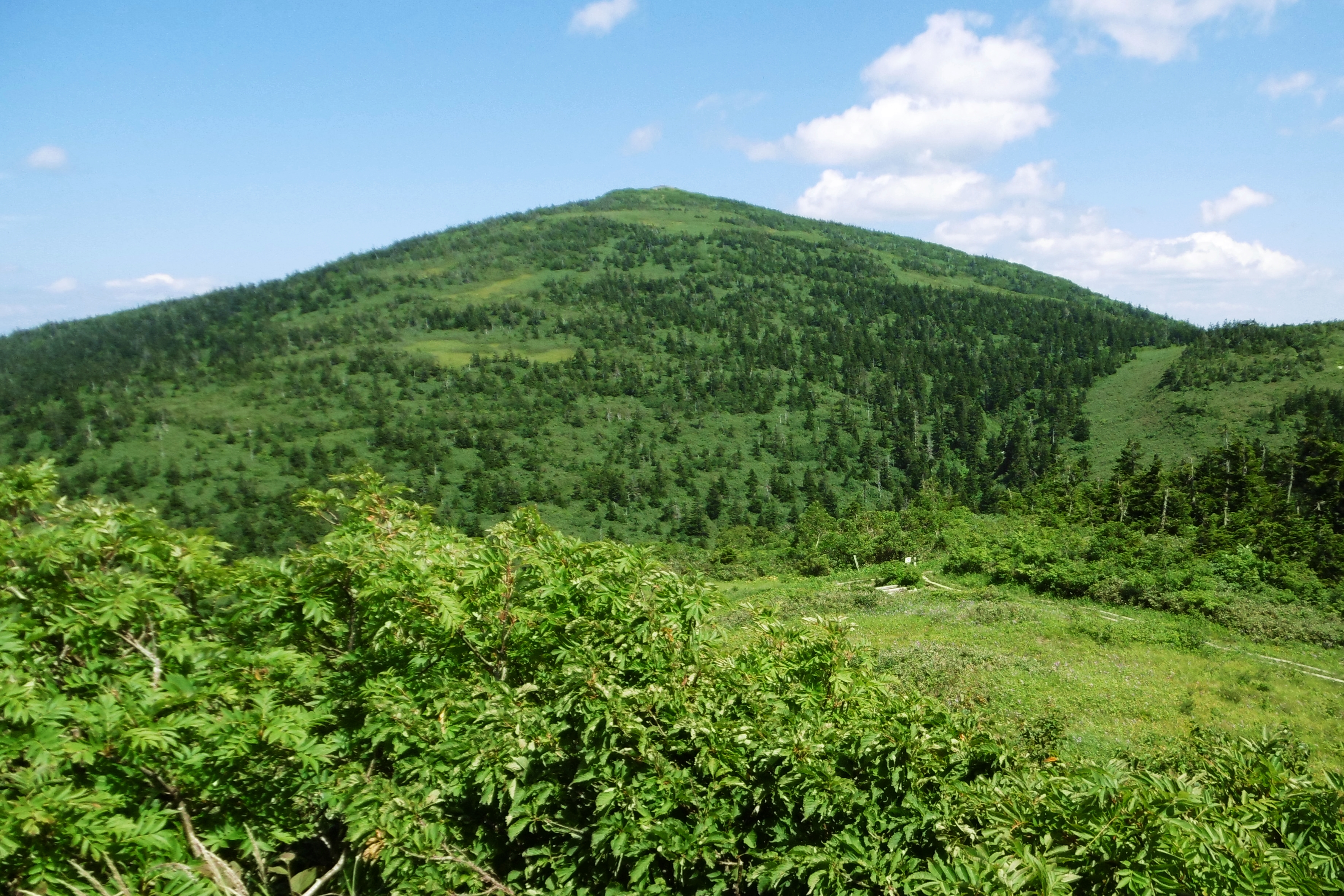 石森より望む森吉山山頂：秋田県北秋田市